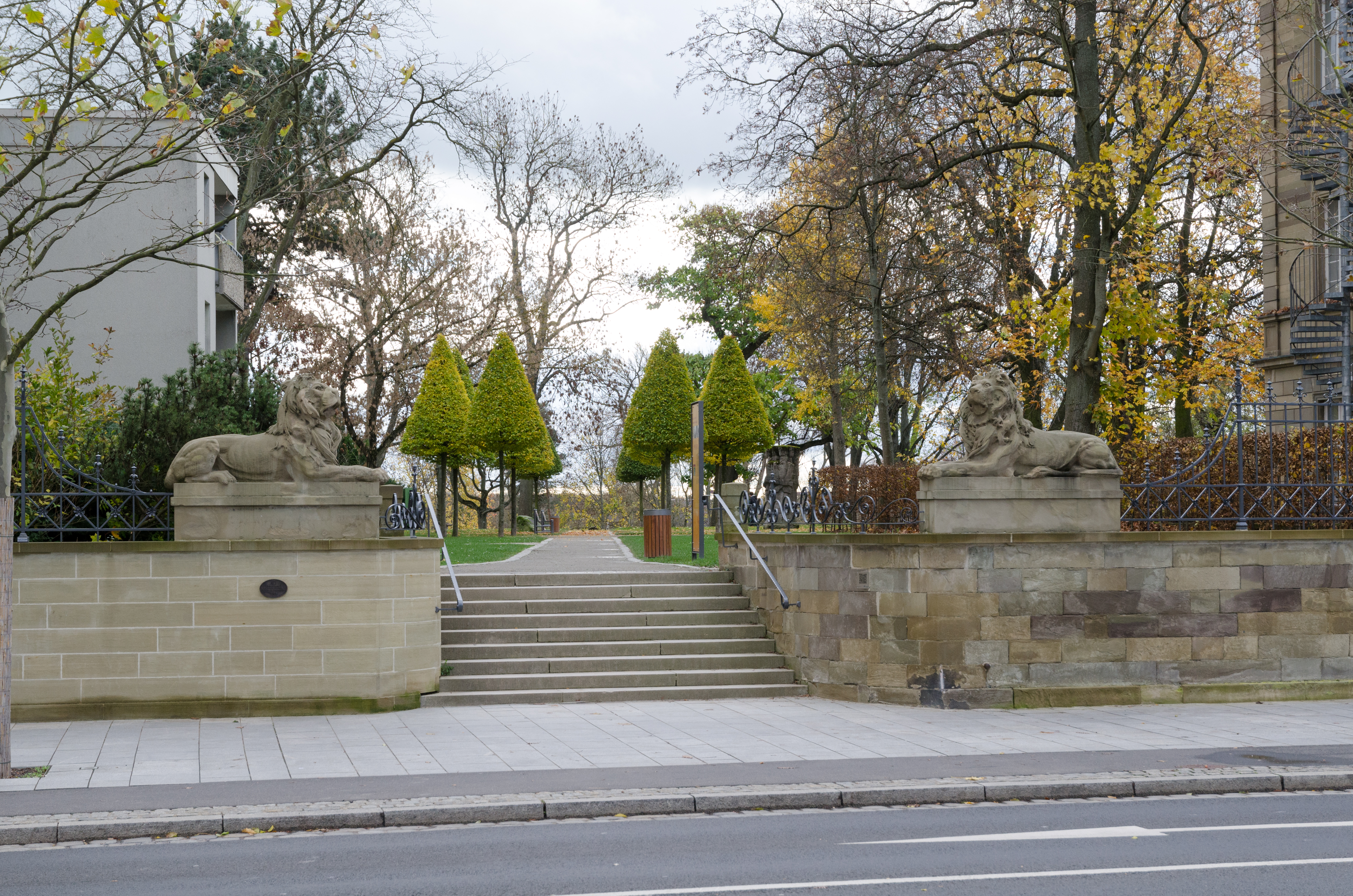 Schweinfurt, Schultestraße, Reste Kriegerdenkmal